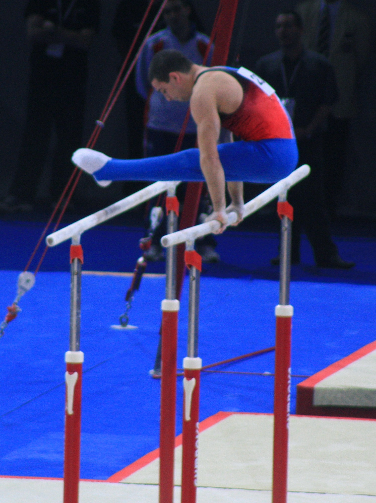 Yann Cucherat en finale des barres parallèles aux 17e Internationaux de France en 2010.